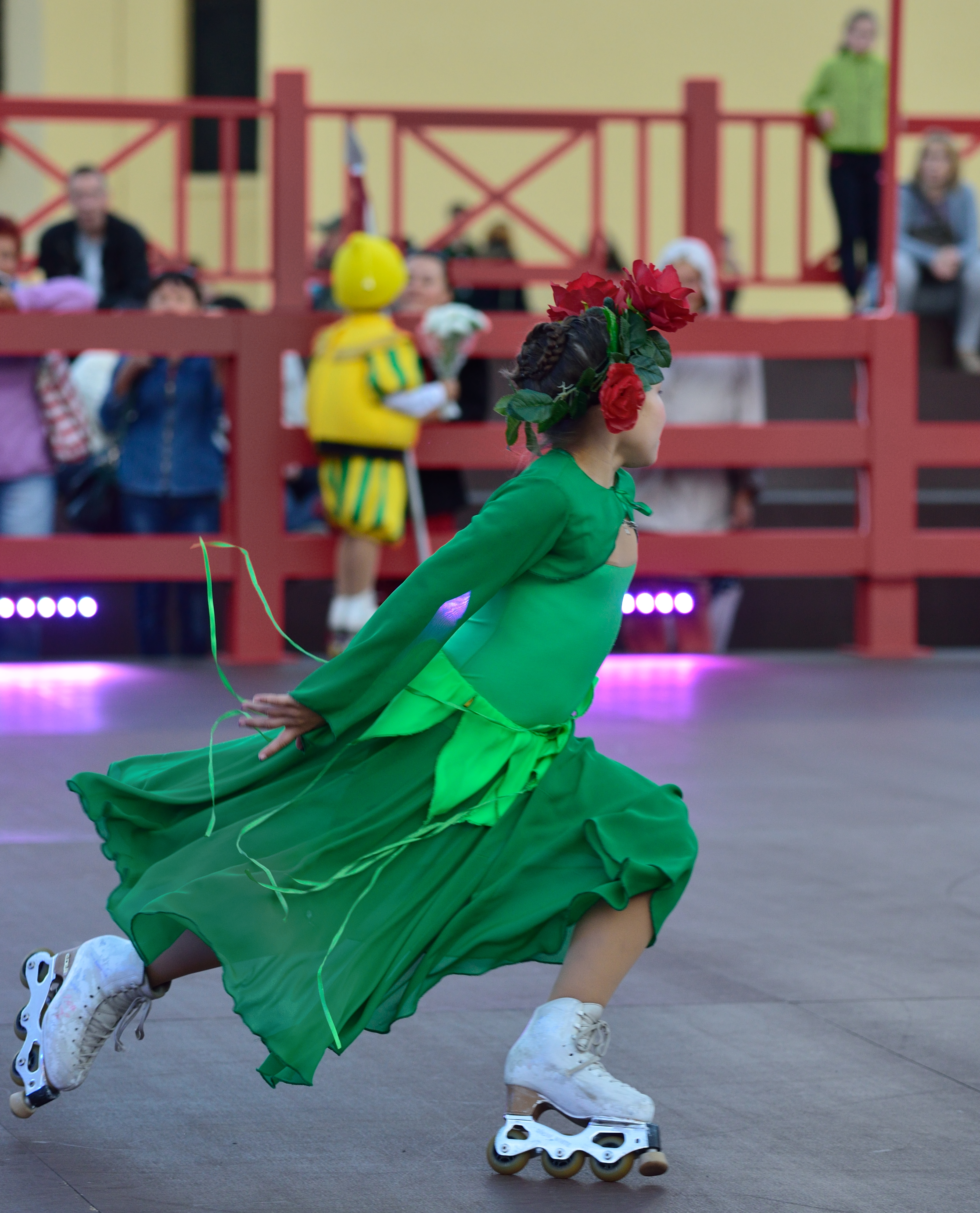 Катание на роликовых коньках